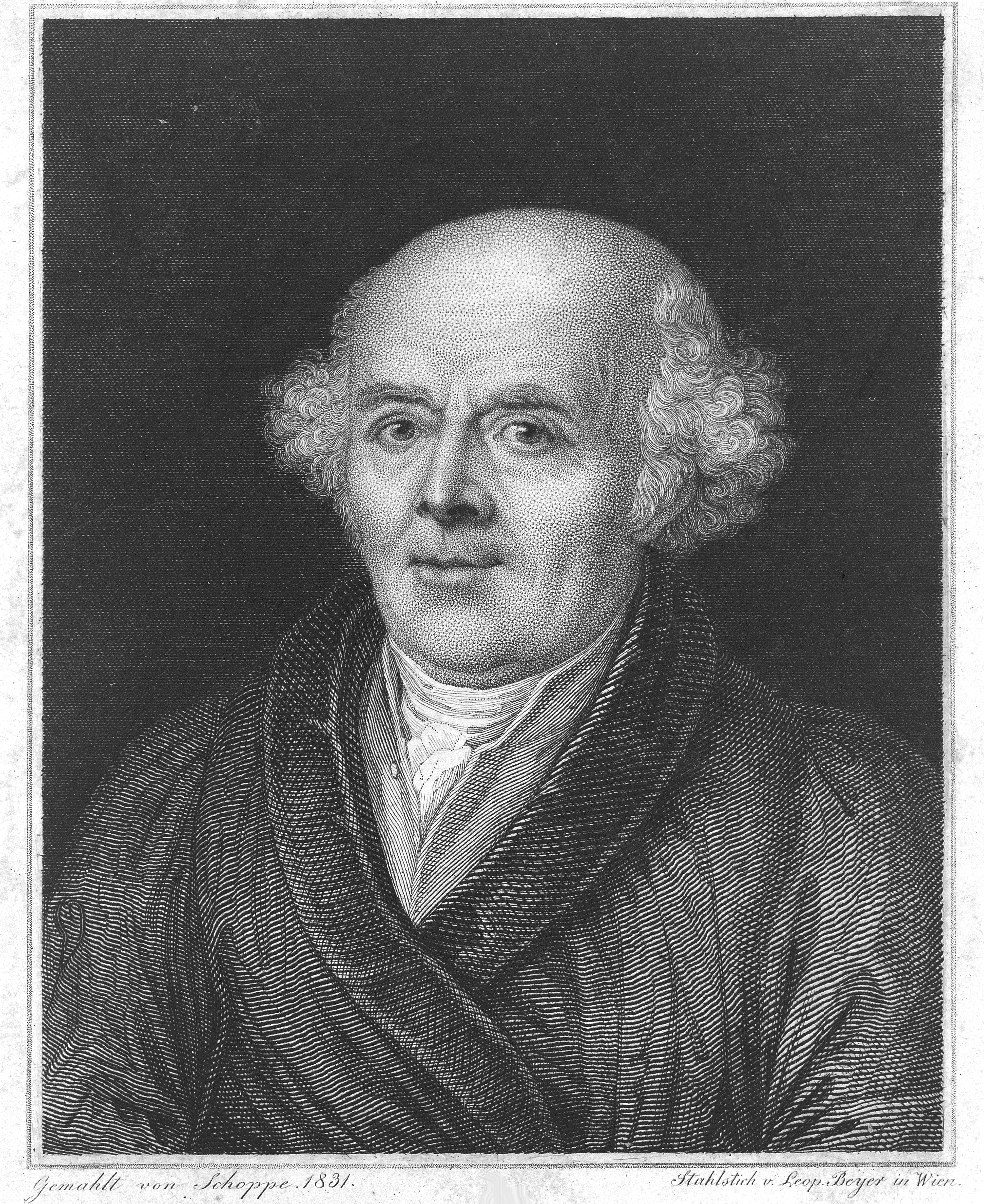 S. Hahnemann